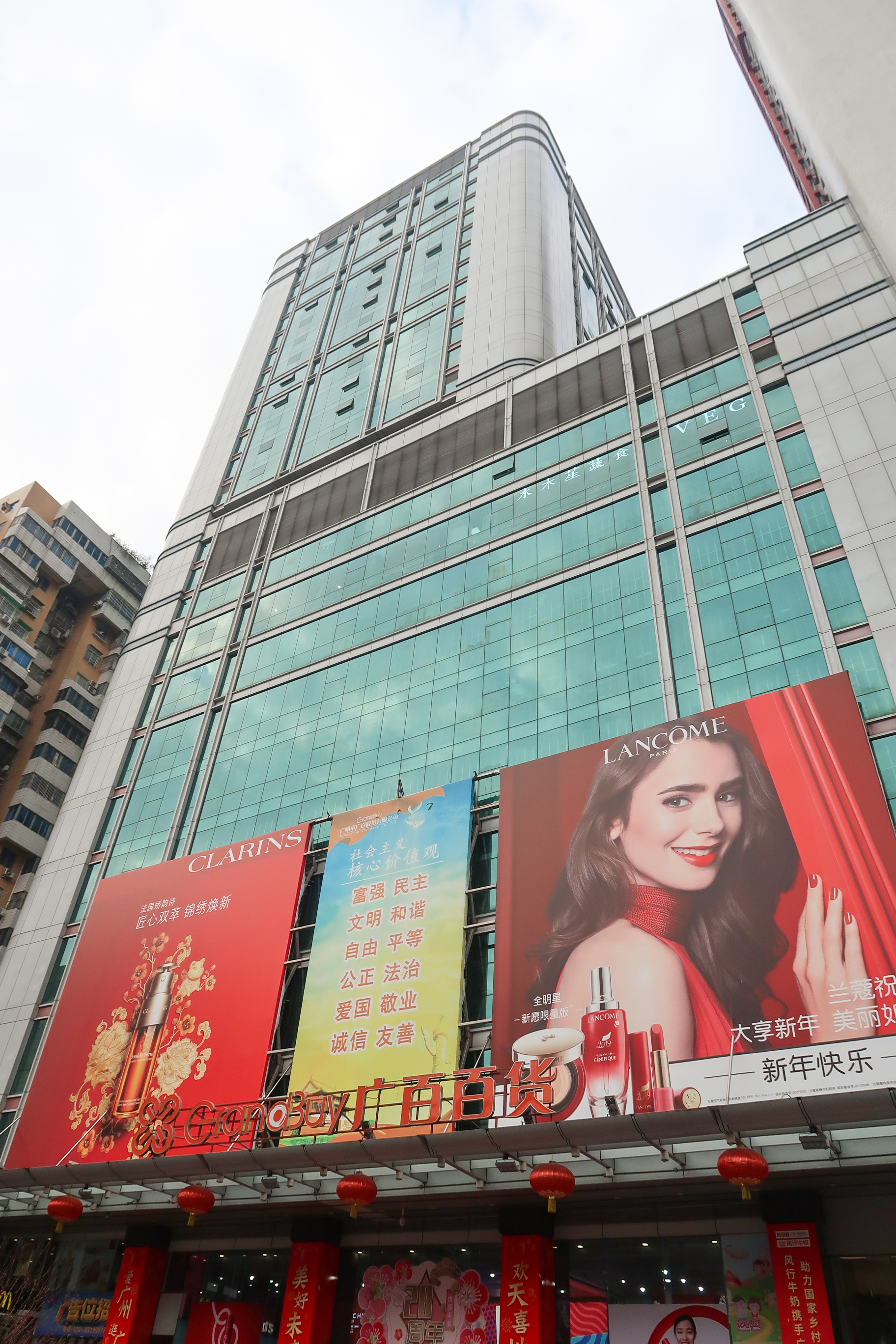 廣百百貨北京路店